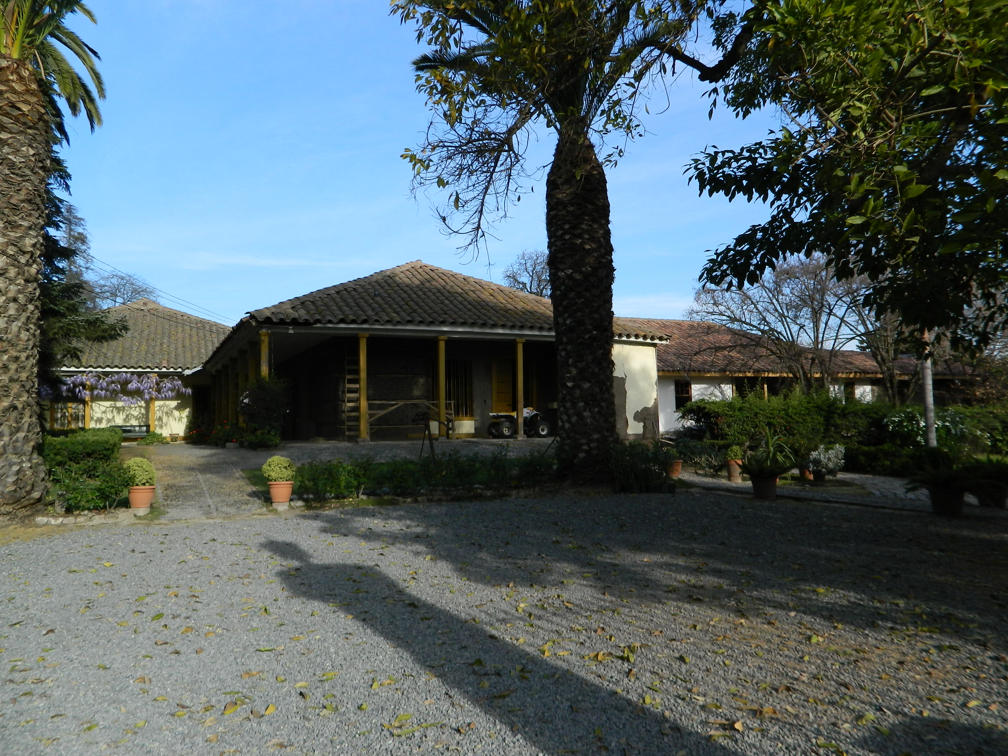 Los edificios de la casa patronal, su parque, llavería y la antigua casa de administración del Fundo Los Perales están protegidos por presentar uno de los pocos conjuntos arquitectónicos rurales aún existentes en Chile central. Las construcciones datan de fines del siglo XVIII y principios del XIX y corresponden a la antigua Hacienda San José. Su estilo representa la típica casa patronal chilena de un piso, con amplios corredores que tienen bases y pilares de gran sencillez. Cuenta con grandes bodegas en torno a un patio con corredores. Estado post terremoto: Sin información. Visitas: Propiedad particular, cerrada al público. Dirección: Av. San Leonardo Murialdo, esquina Caupolicán, Requinoa. This is a photo of a national monument in Chile: 637